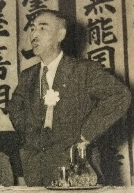 大日本生産党創設者、吉田益三